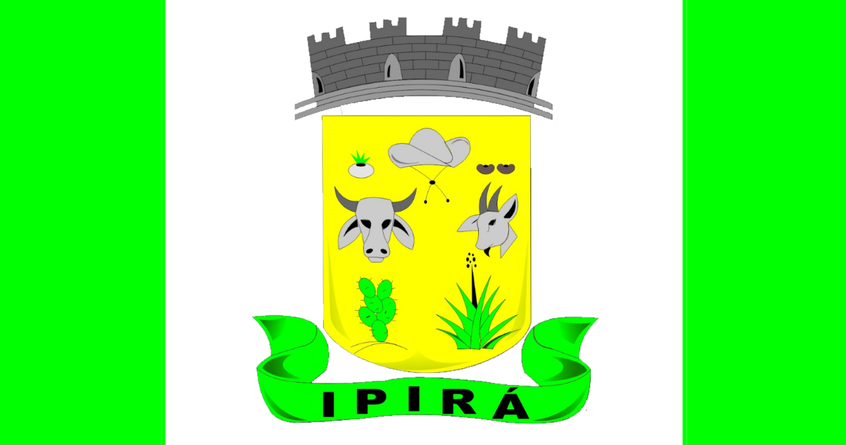 Imagem da bandeira do Município de Ipirá